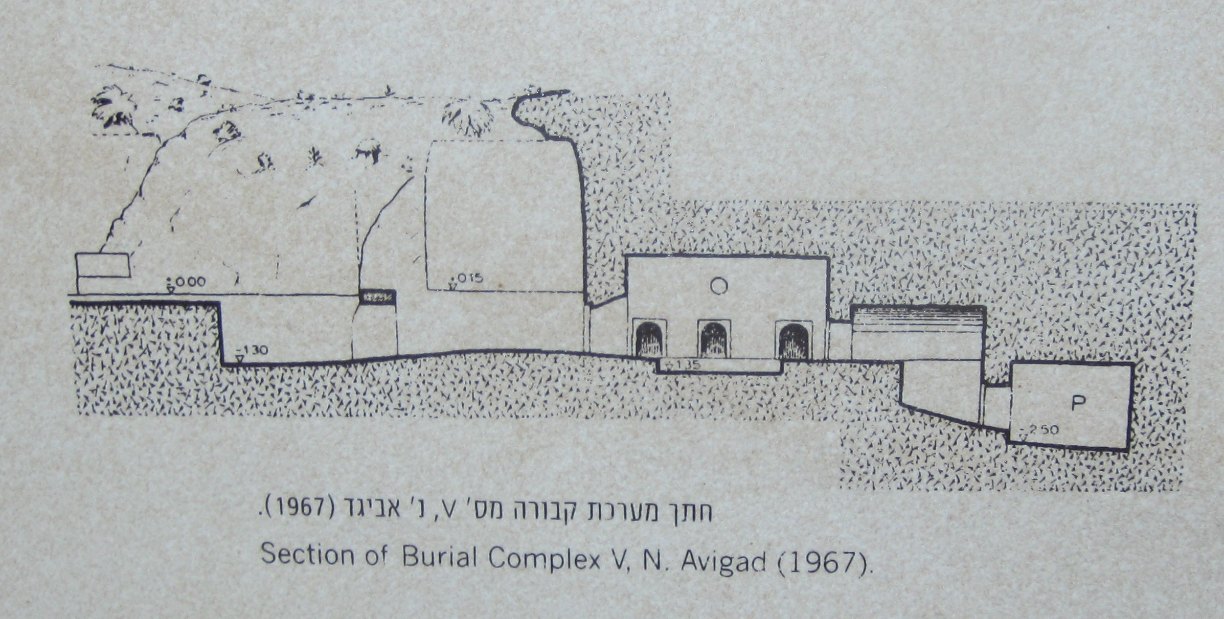 Mount Scopus הר הצופים